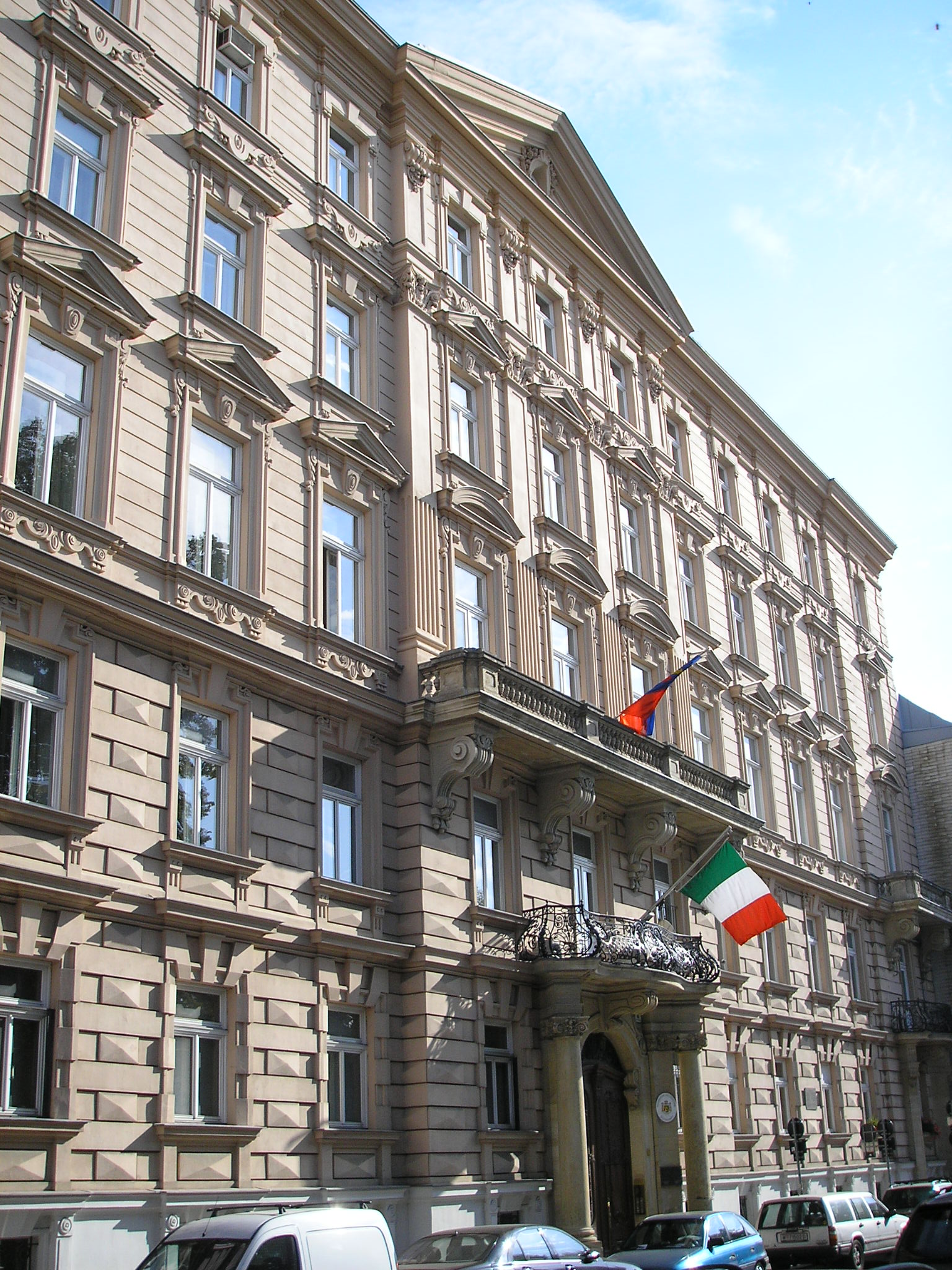 Embassy of Liechtenstein in Vienna.